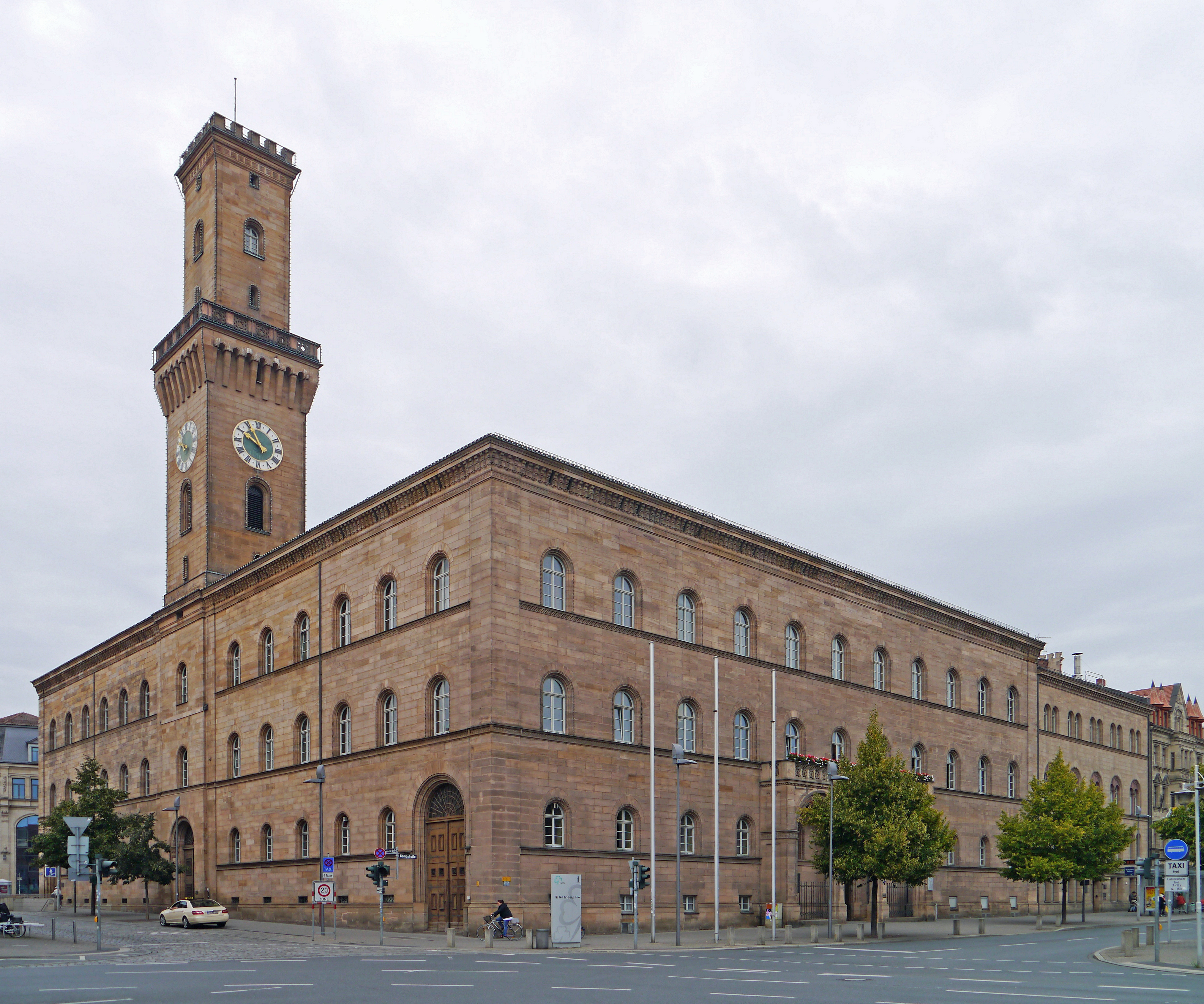 Das Rathaus in Fürth, 2014 von der Königstrasse aus.